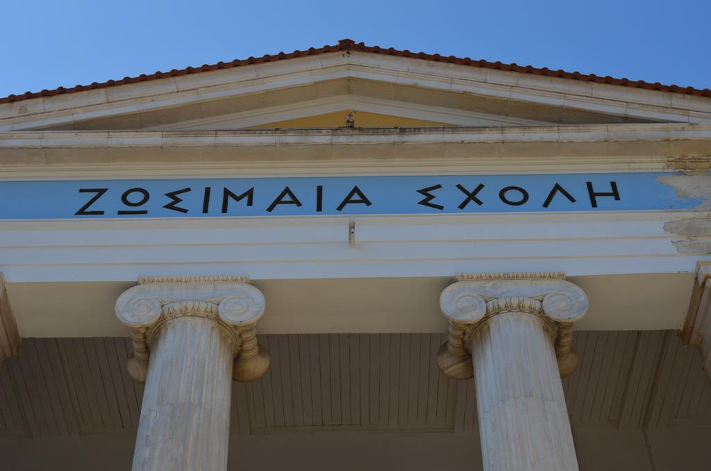 Mvskoke: 1ο Γυμνάσιο Ιωαννίνων